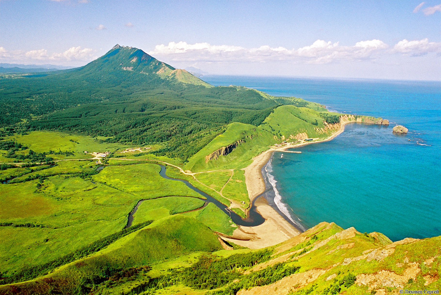 Хребет Жданко: - 48°03'26" N 142°32'53" E. Координаты центральной точки - 48°03'44" N 142°31'52" E.,Макаровский район, Сахалинская область This image is related to the protected area of Russia number 6510057